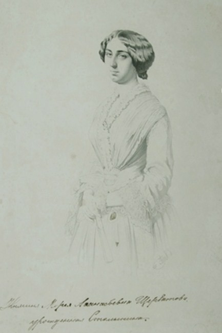 Княгиня Мария Афанасьевна Щербатова, ур. Столыпина (1832—1901), с 1851 года жена князя В. А. Щербатова.